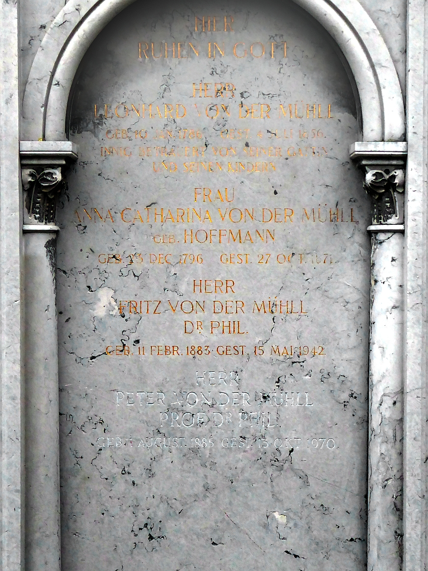 Friedrich (Fritz) von der Mühll (1883–1942) Dr.phil., Althistoriker, Gymnasiallehrer, Grab auf dem Friedhof Wolfgottesacker, Basel